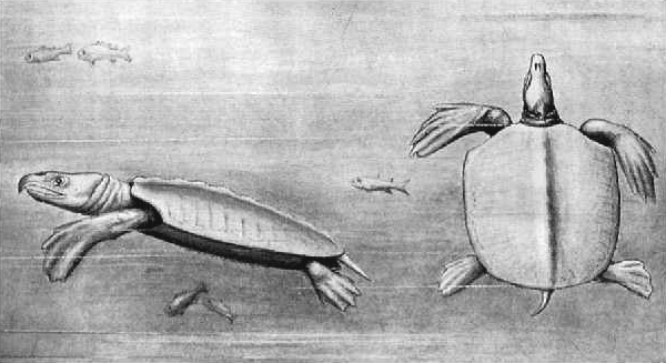 Lebendrekonstruktion von Archelon ischyros, Wieland 1896 aus der Oberkreide, der größten bekannten Meereschildkröte. andere Versionen: n. b.